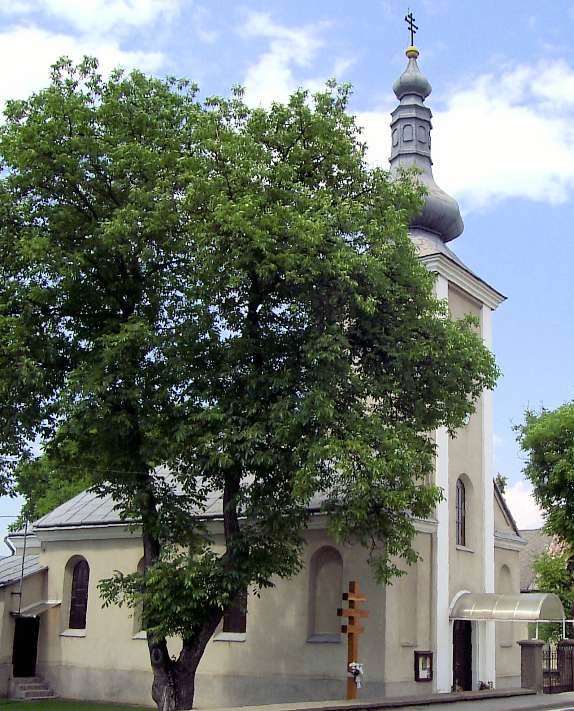 Stročín, Grécko-katolícky kostol